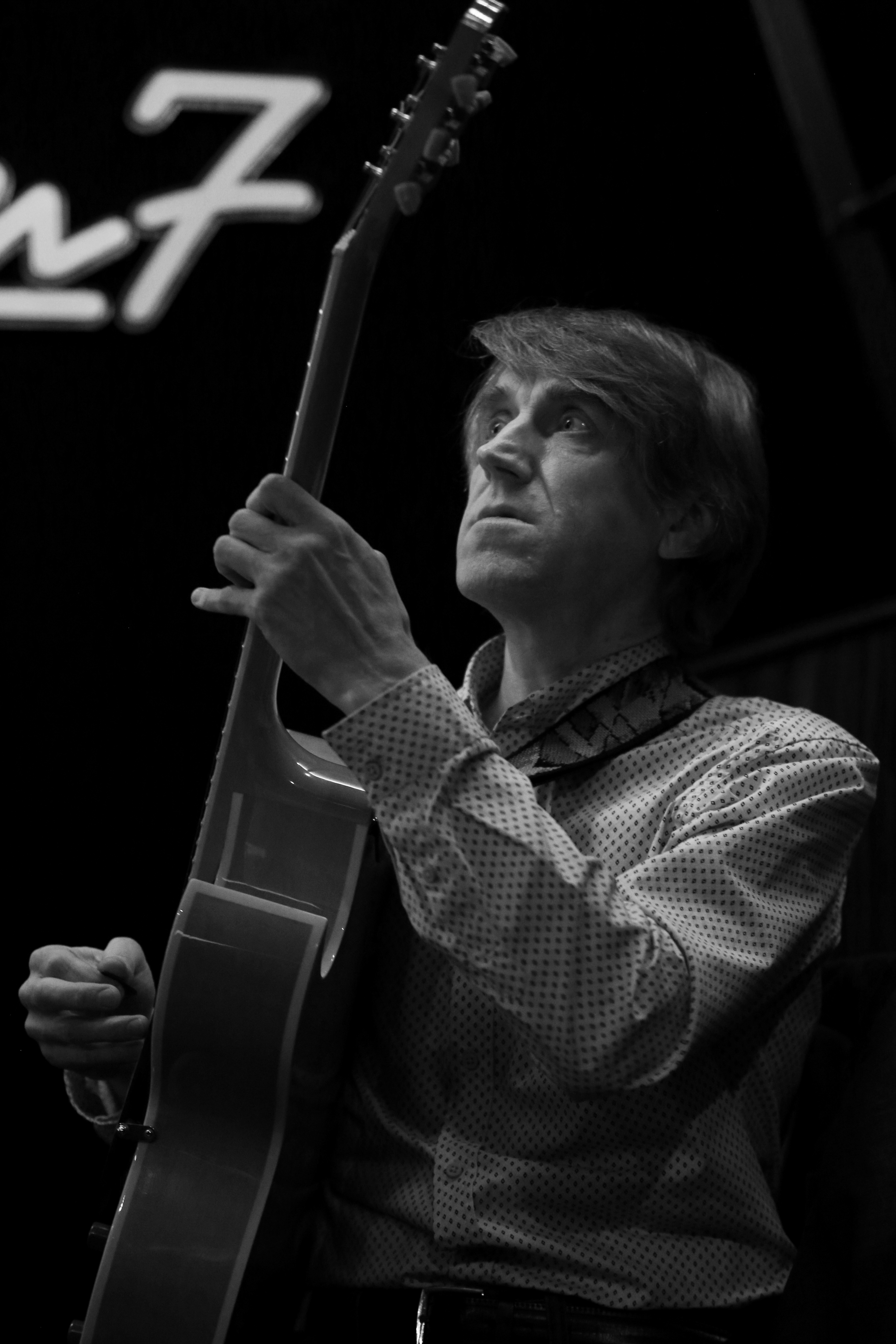 Андрей Рябов